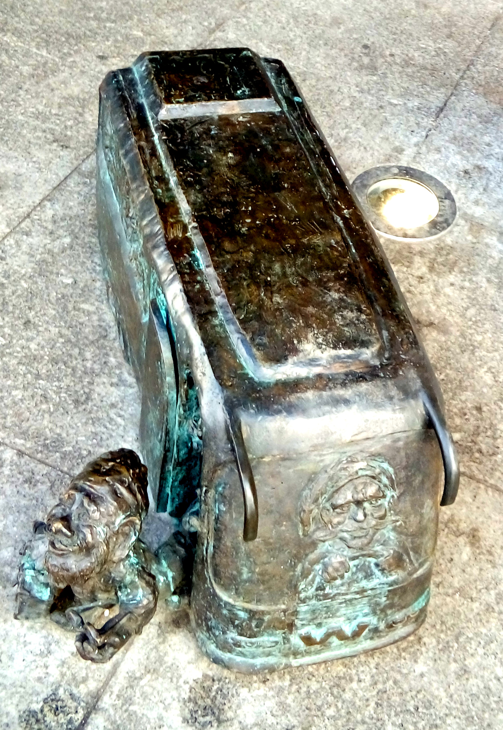 Wrocław, centrum handlowe Wrocłavia, ul. Sucha - krasnal Polbusek autorstwa Grzegorza Łagowskiego